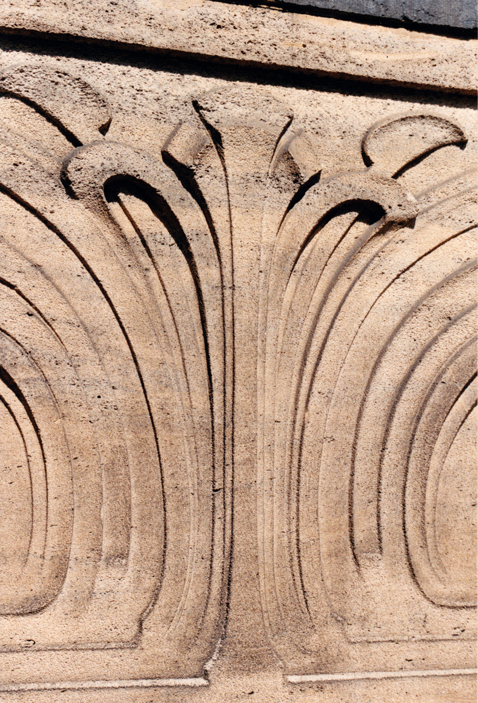 Belgique - Bruxelles - Maison Aglave